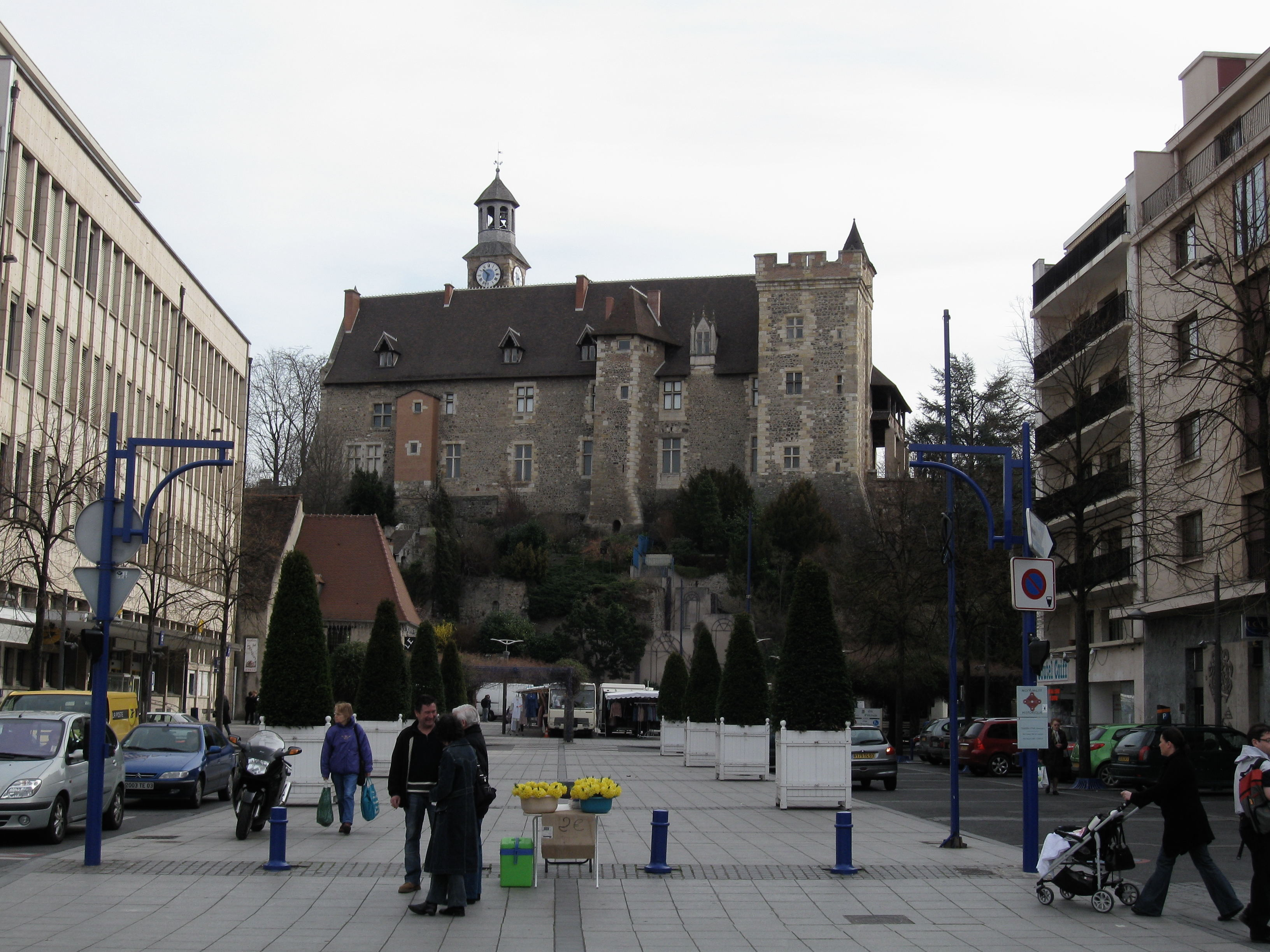 Château des Ducs de Bourbon, Montluçon, Allier, France